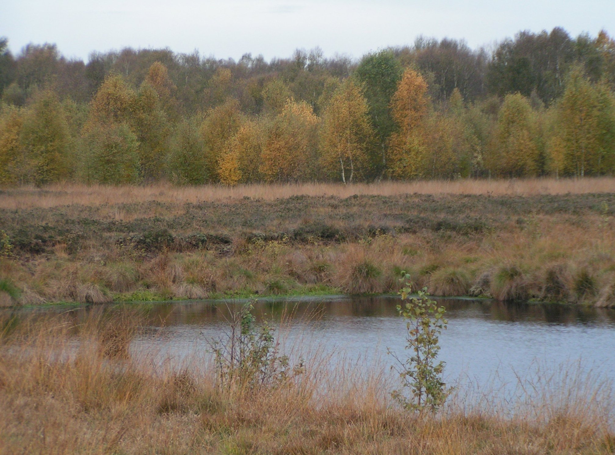 Rehdener Geestmoor im Herbst